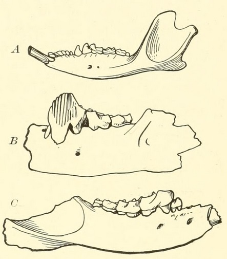 Caenolestidae mandibles